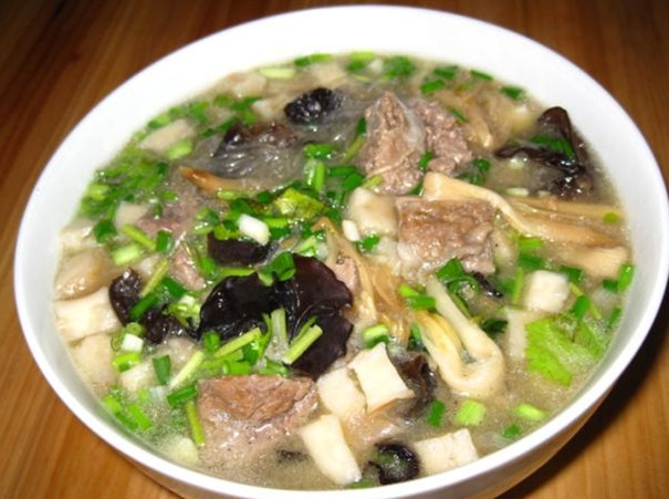 西安小吃有名